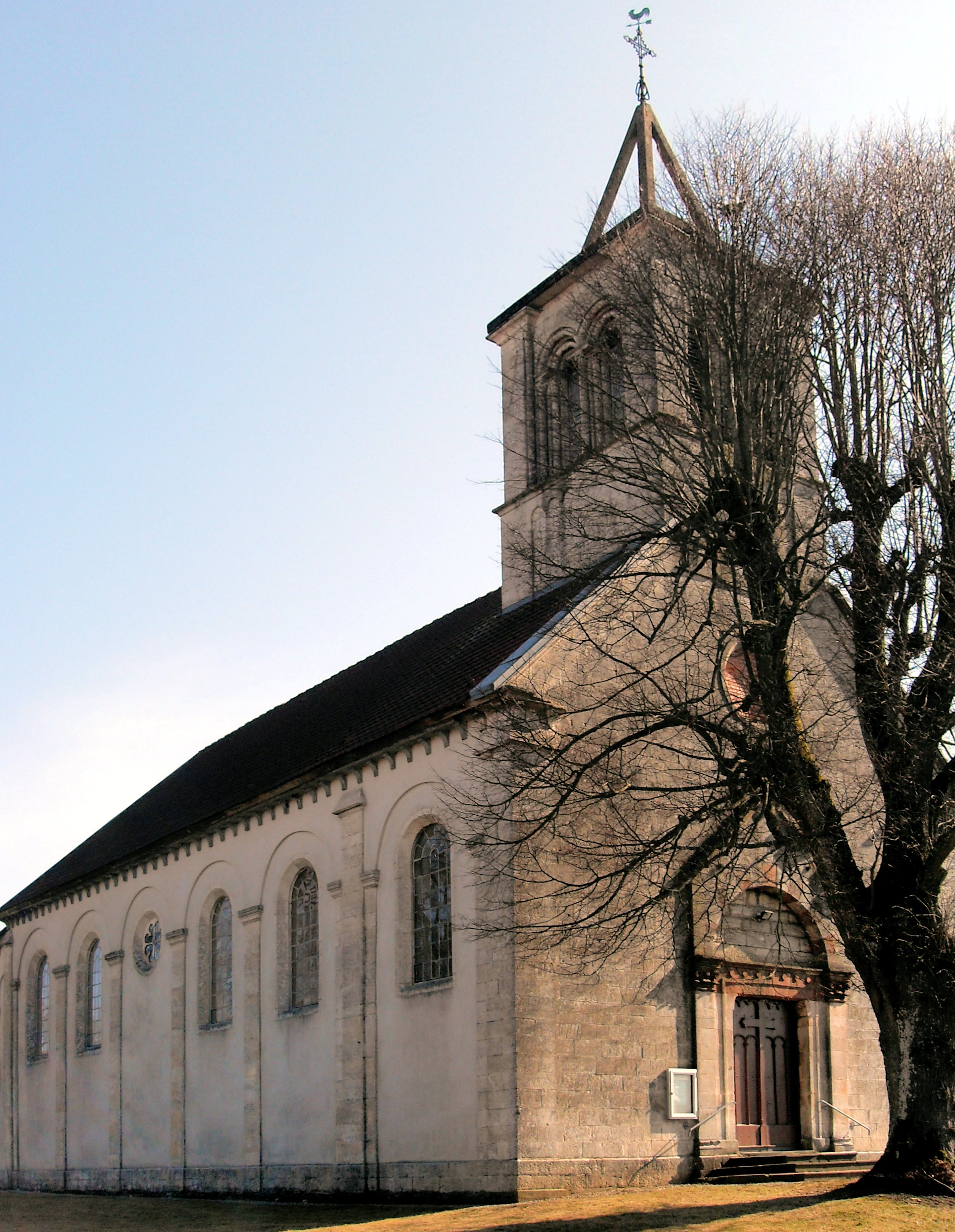 L'église de la Nativité-de-Notre-Dame à Petit-Croix